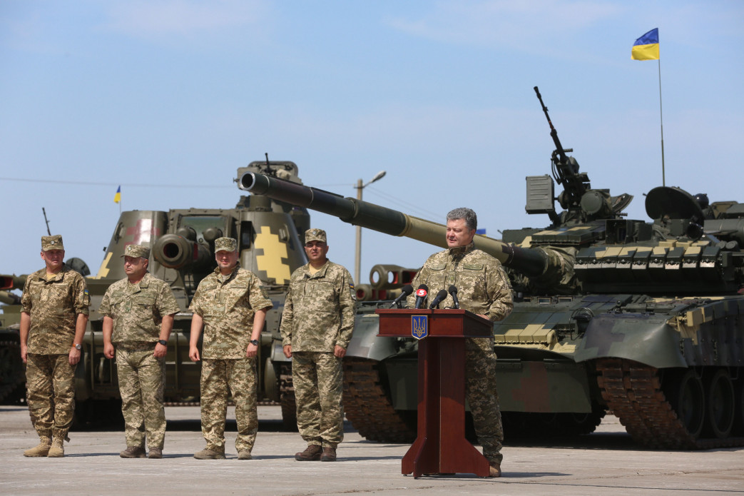 Президент передав озброєння та військову техніку особовому складу Збройних Сил України.